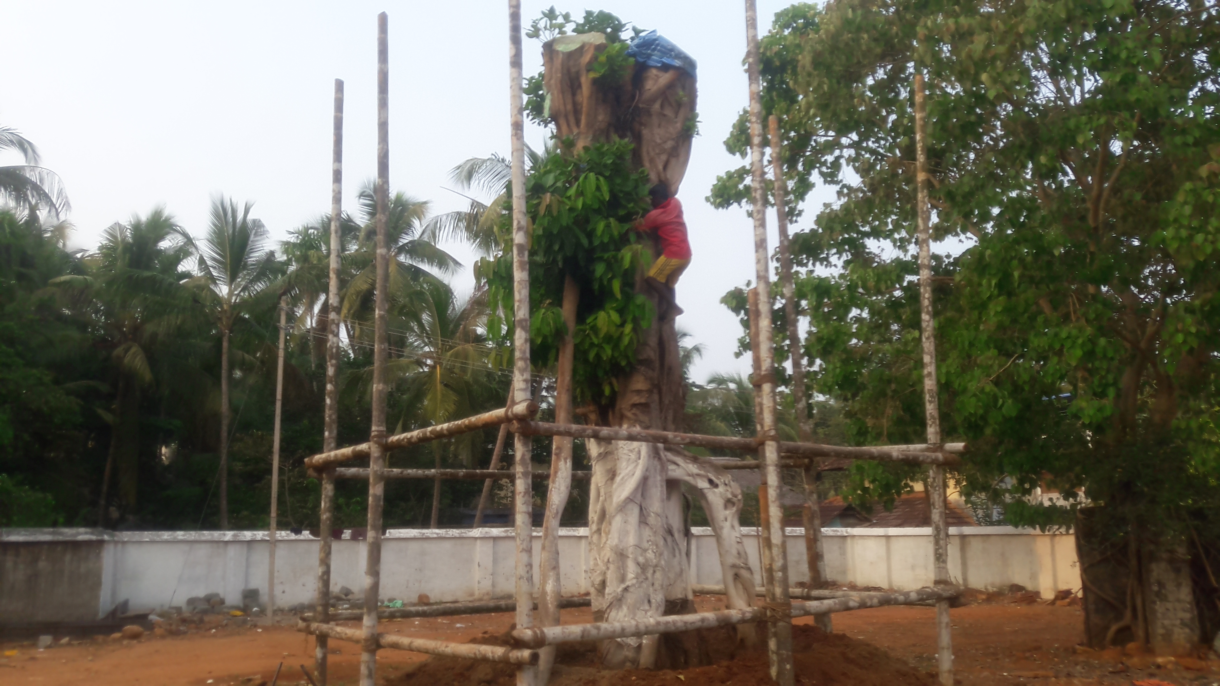 നഗരസഭയുടെ സാമ്പത്തിക സഹായത്തോടെ, എം.എല്‍.എ ഓഫീസിന്‍റെസഹായത്തോടും, മലയാള മനോരമ പൊന്നാനി ലേഖകന്‍ ശ്രീ ജിബീഷ് വൈലിപ്പാട്ടിന്റെ കാമ്പയിനോട് പൊന്നാനി ഉറൂബ് നഗറില്‍ കാറ്റിലും മഴയിലും കടപറഞ്ഞു വീണ പേരാല്‍ മരത്തെ പറിച്ചു നടല്‍ പ്രക്രിയ മൂലം പൊന്നാനിയില്‍ തന്നെയുള്ള മാതൃ ശിശു ആശുപത്രിയിലേക്ക്‌ മാറ്റി വെച്ച ശേഷമുള്ള പ്രൂണിങ്ങ്.